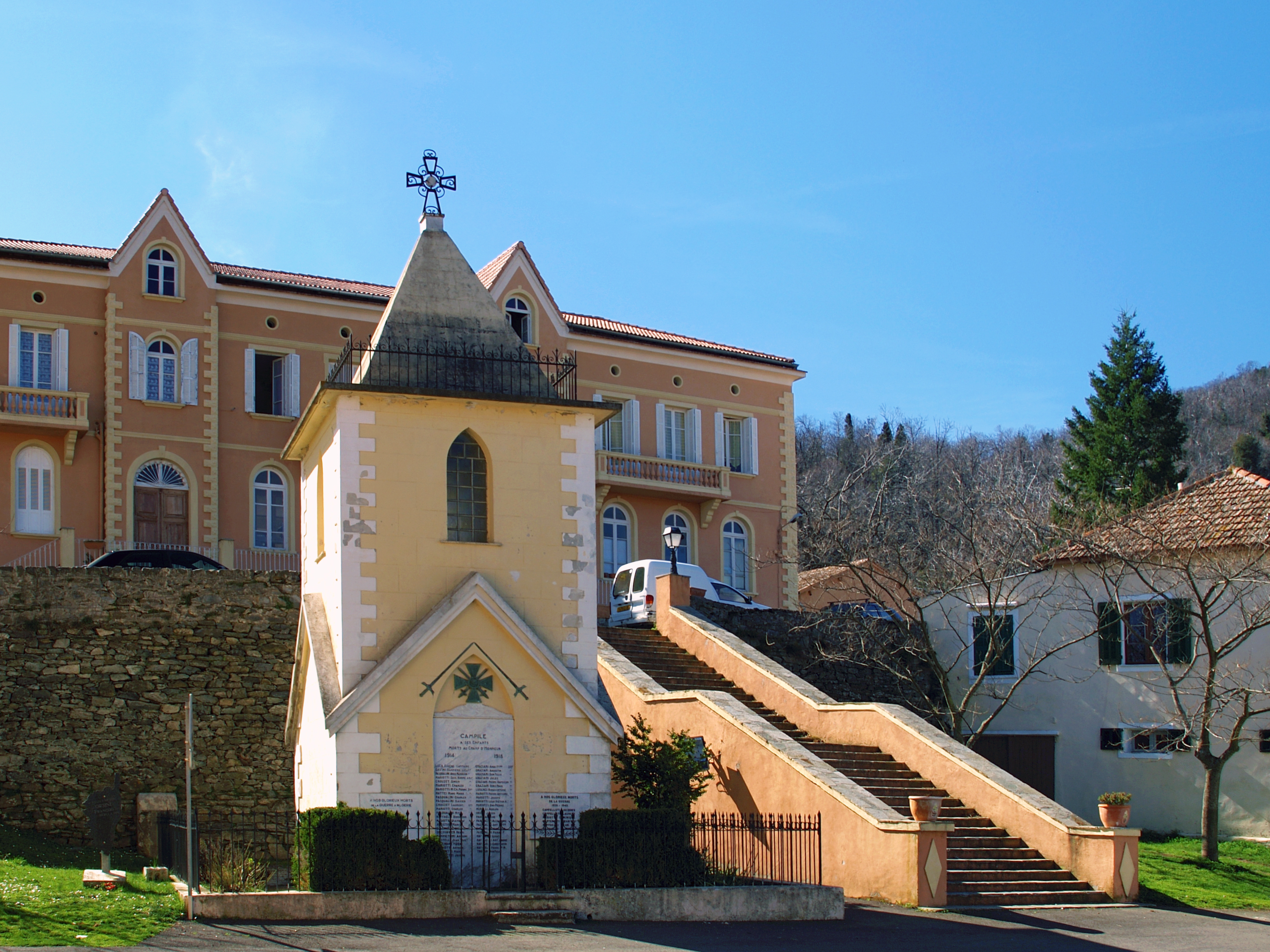 Campile, Castagniccia (Corse) - Monument aux morts